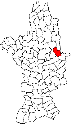 Categorie:Hărţi ale judeţului Olt